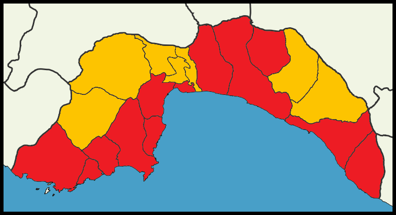 Antalya'da 2014 Türkiye cumhurbaşkanlığı seçimi